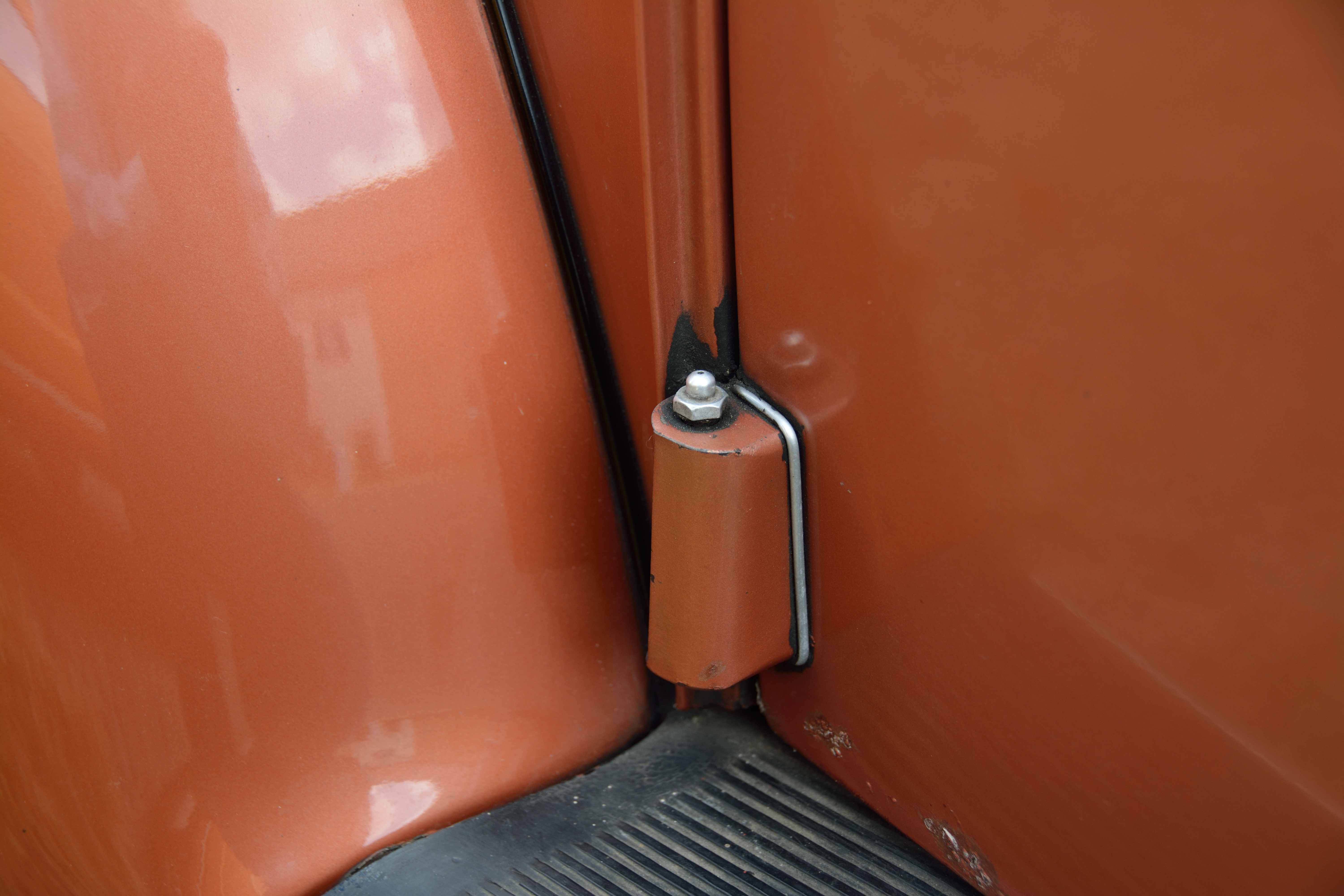 Ein Schmiernippel an der Fahrertür eines VW Käfers Cabrio von 1956